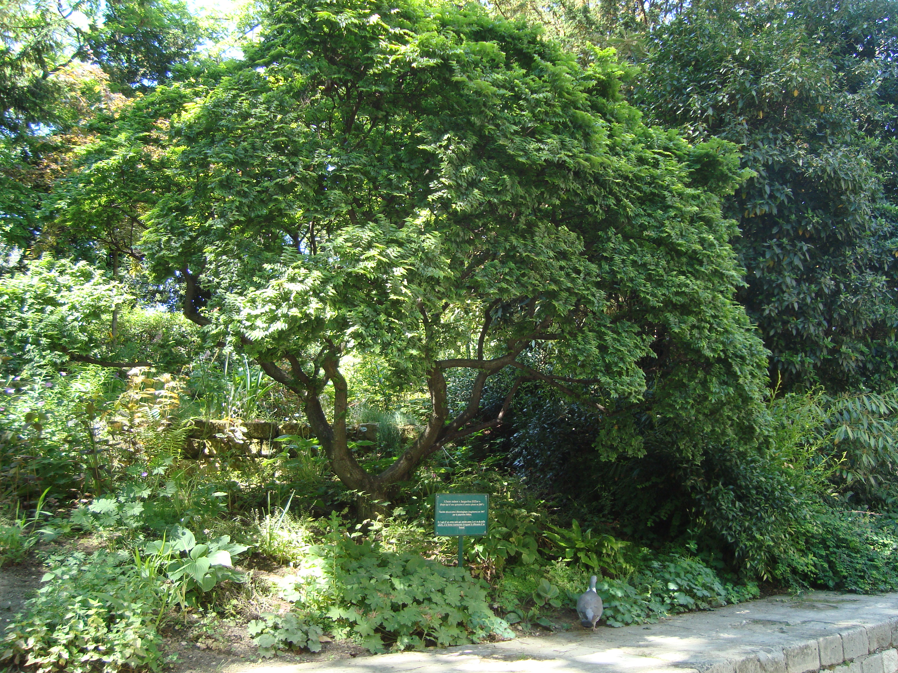 Ulmus minor ou orme champêtre var. Jacqueline Hillier (orme nain) âgé d'environ 15 ans et planté en 2007 aux Arènes de Lutèce, Paris